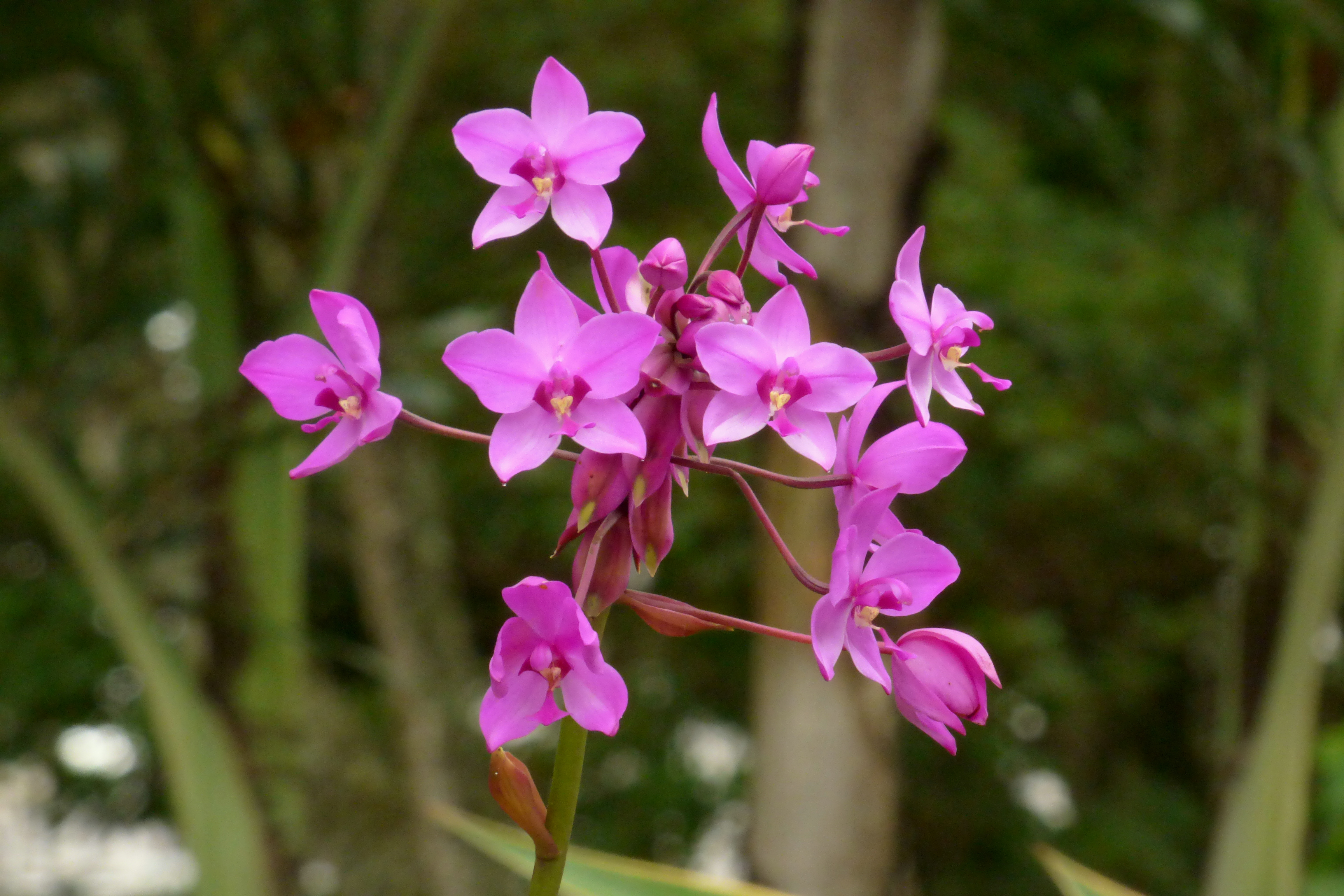 Orquídea de tierra (Spathoglottis plicata)